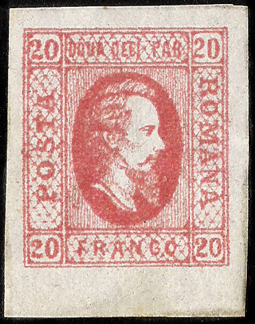 Почтовая марка Объединённого княжества Валахии и Молдавии (Румынии), князь Александру Иоан Куза